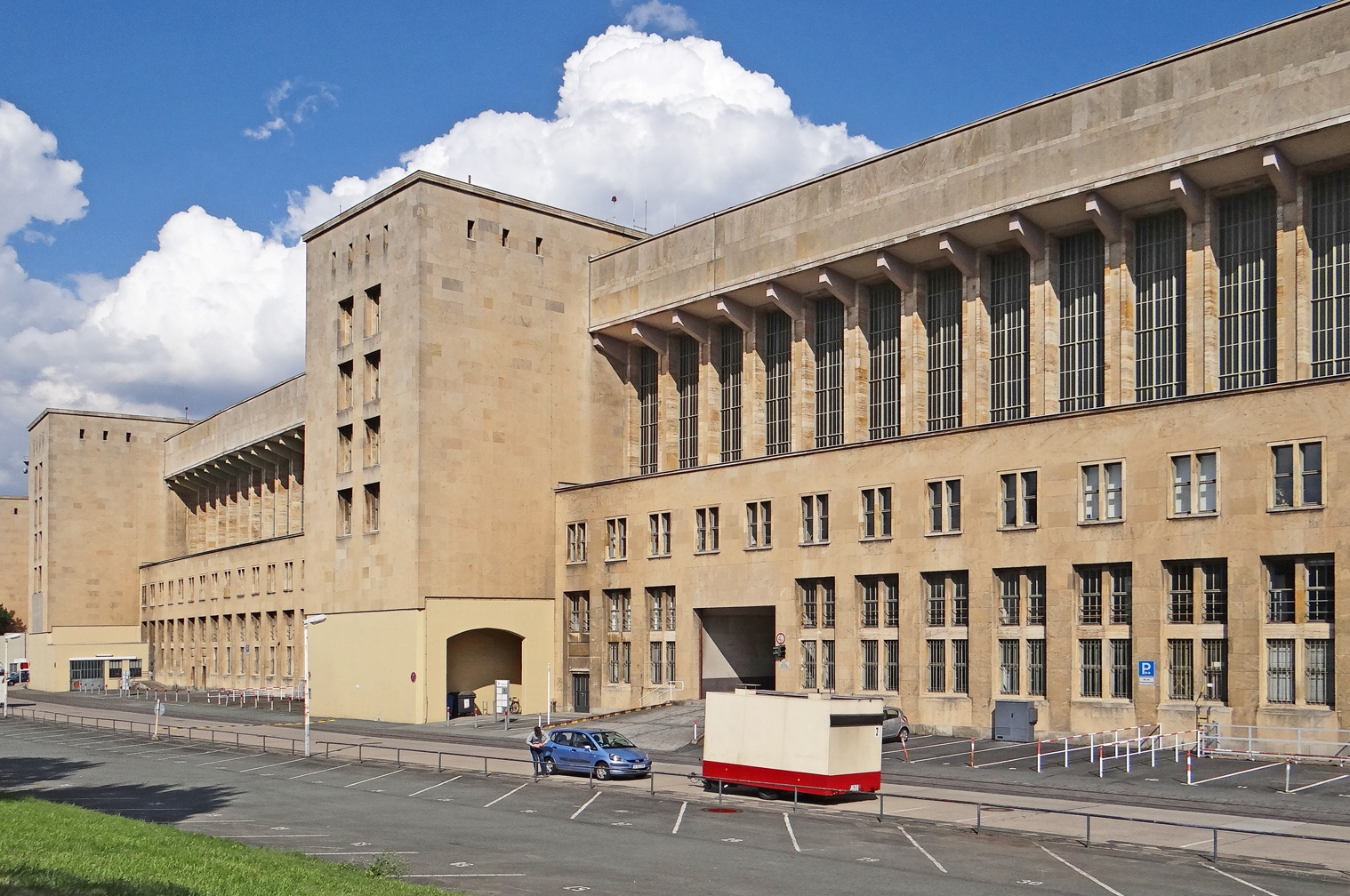 Bâtiments de l'ancien aéroport de Tempelhof construits au moment du IIIème Reich Flughafen Tempelhof Le site a servi de piste pour les avions dès 1909. Le premier aéroport de Tempelhof date de 1923. En 1939, l'architecte Ernst Sagebiel a conçu des bâtiments en forme de coquille autour de l'espace des pistes. Cette construction dans le style national-socialiste était à l'époque le bâtiment continu le plus grand du monde. Il faisait partie du projet Germania d'Albert Speer. Après guerre, l'aéroport a été utilisé par les Alliés dès 1945, puis aménagé en aéroport civil en 1962. Il a été fermé en octobre 2008 au moment où l'aéroport de Schönefeld a été opérationnel, Tempelhof a été transformé en parc de loisirs ouvert au public en mai 2010.